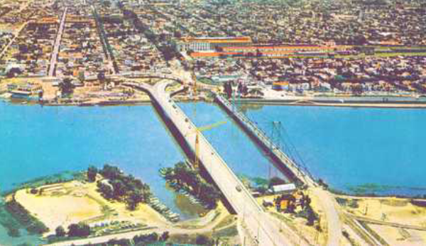 Imagen de 1970/71 mostrando los puentes Oroño (hormigón) y Candioti (colgante), localizados en la ciudad de Santa Fe, Argentina.